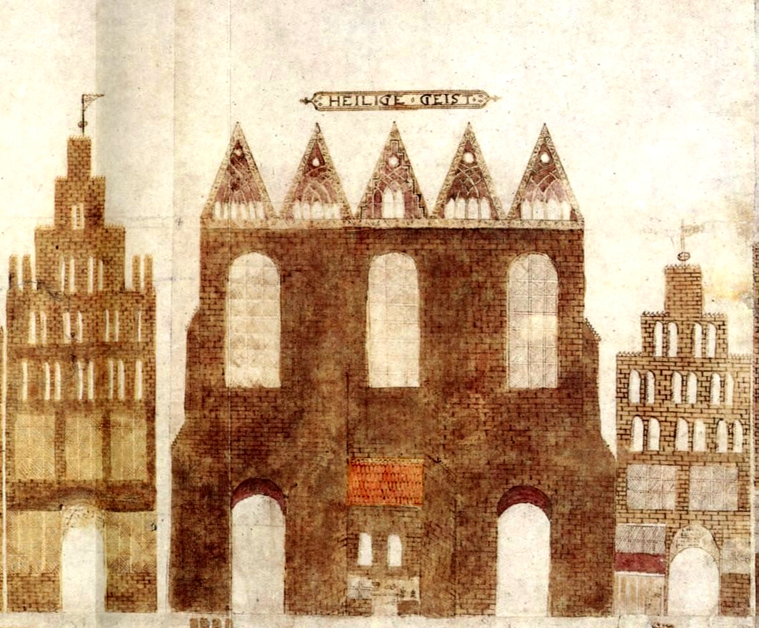 Detail Heilig-Geist-Kirche aus der Vicke Schorler Rolle. Blatt 4/9